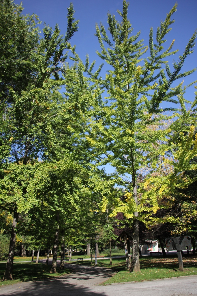 Entrada desde la Avenida de la Magdalena